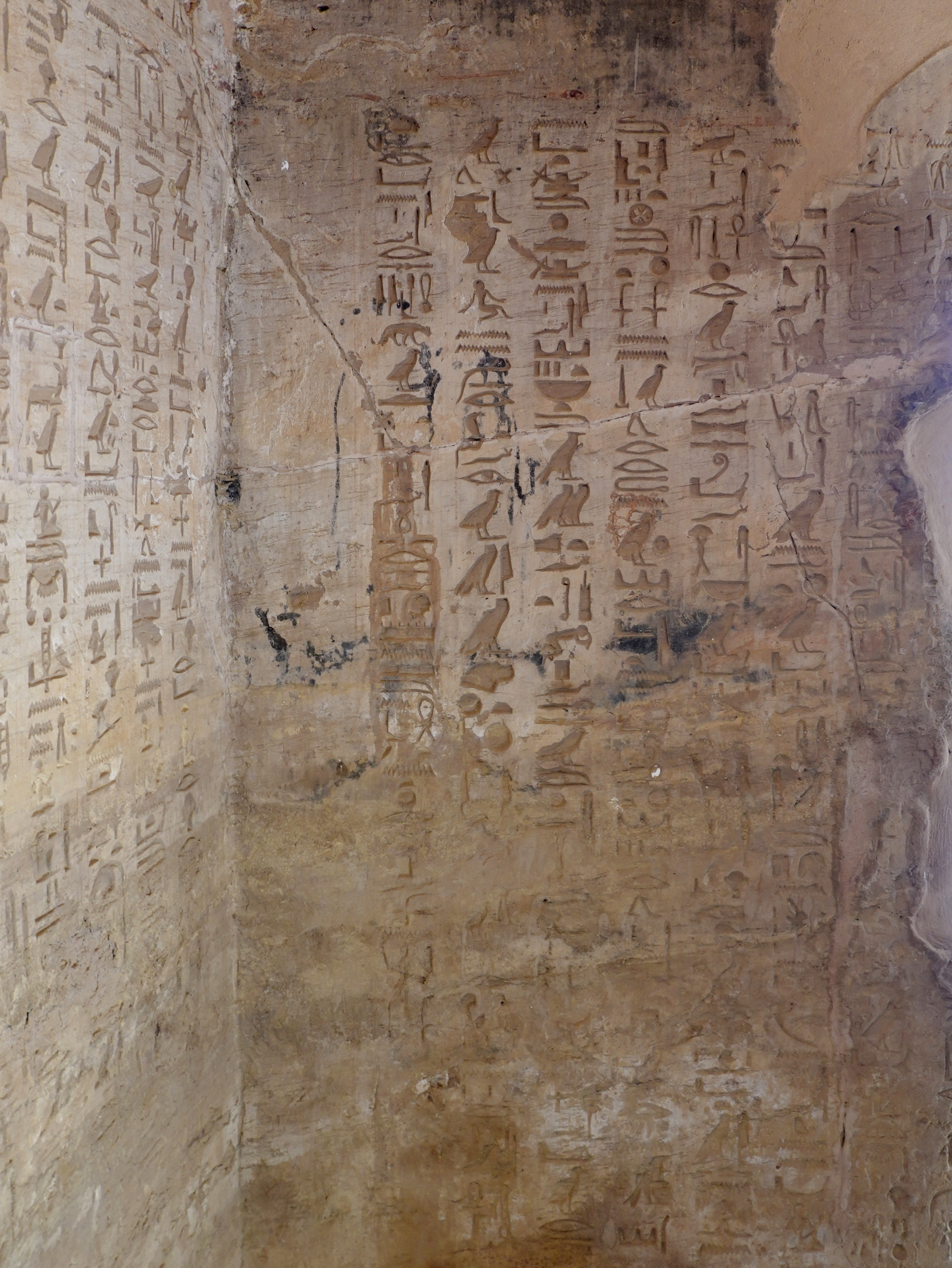 Felsengrab des Ahmose, Sohn von Ibana, unter den Felsengräbern des altägyptischen Necheb bei el-Kab, Ägypten